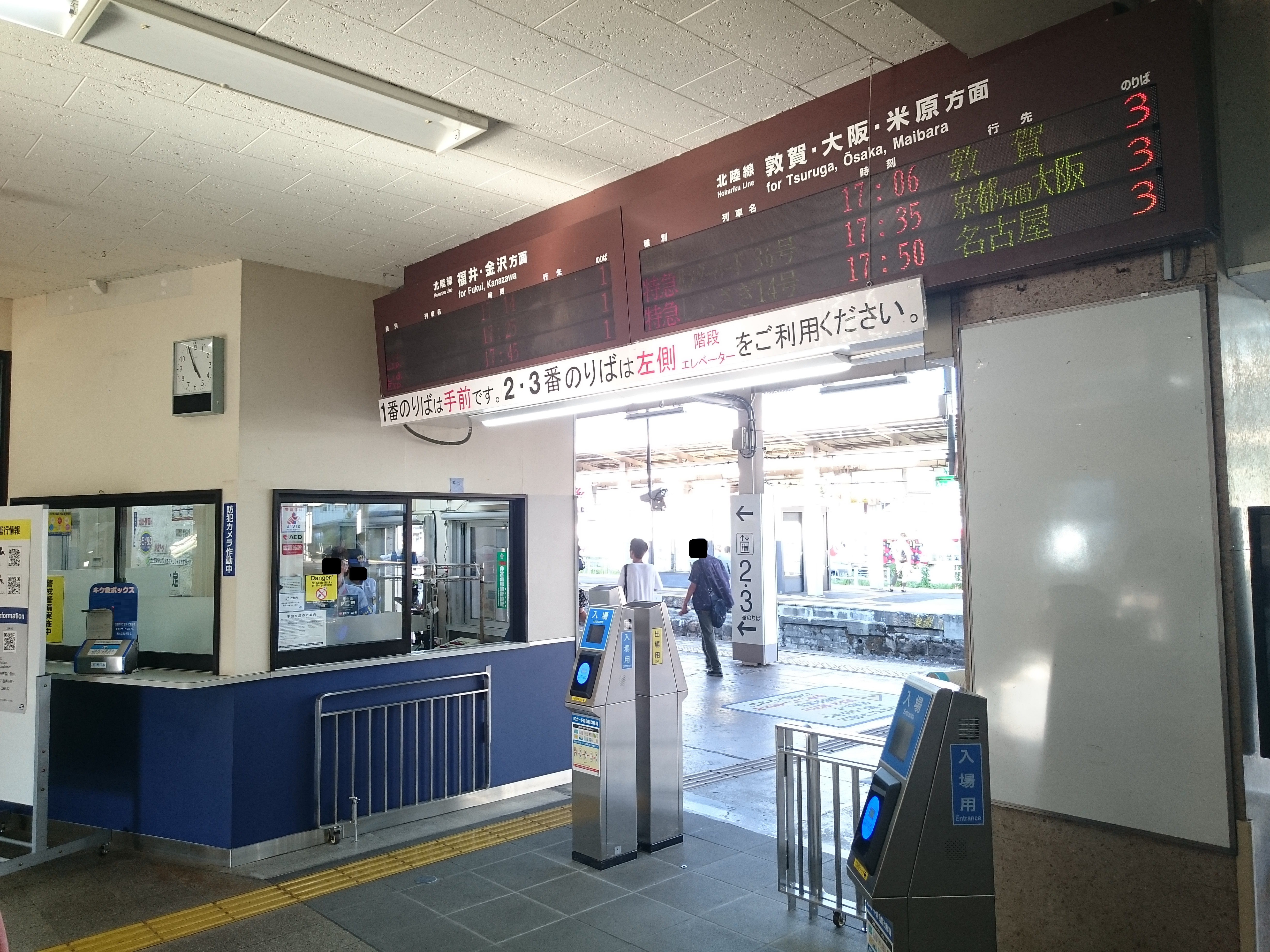 武生駅のコンコース（改札口） Sony Xperia Z3